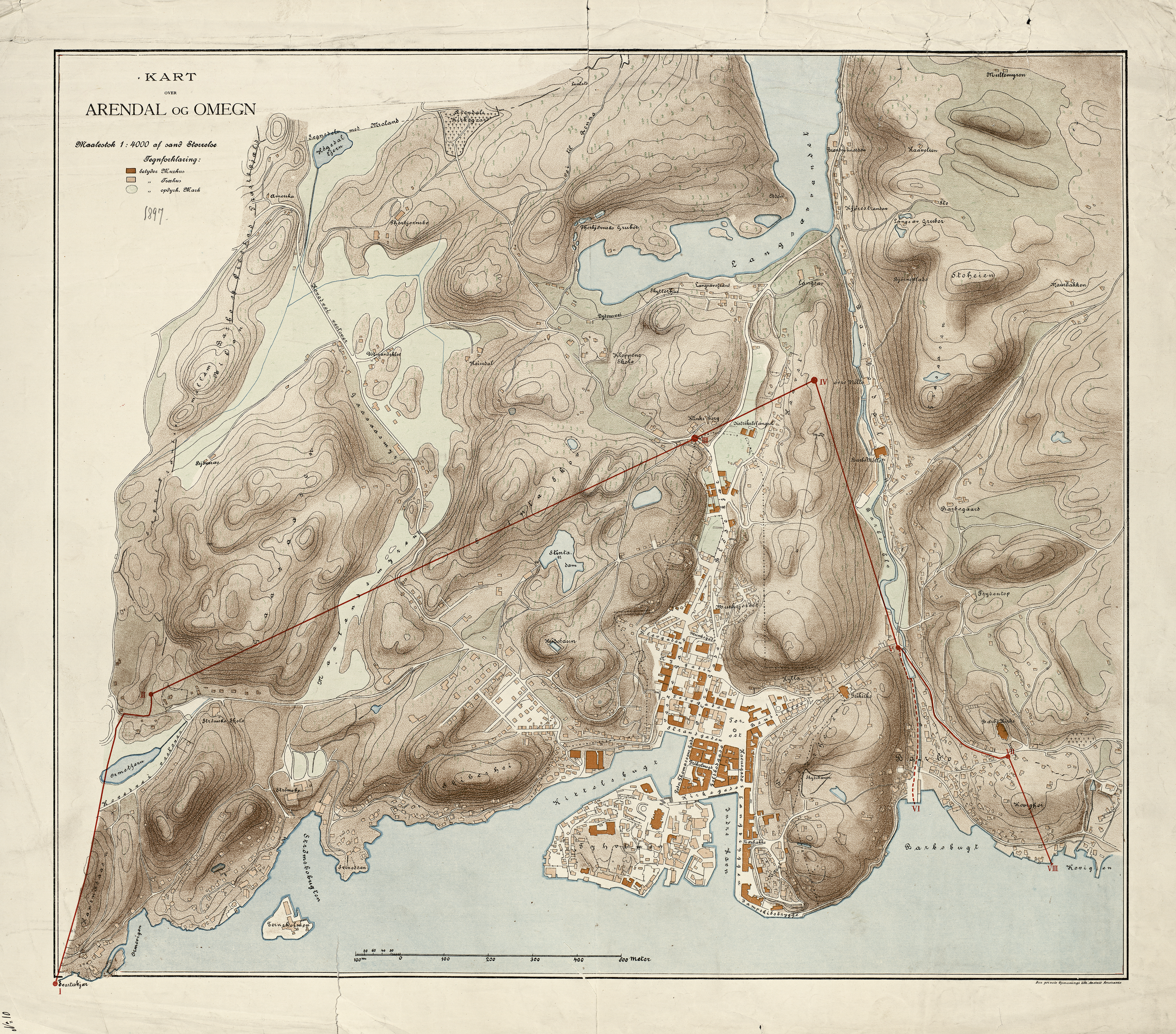 Kart over Arendal og oomegn (1897)